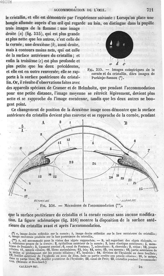 Fig. 335. Images catoptrique de la cornée et du cristallin, dites des images de Purkinje-Sanson/ Fig. 336. Mécanisme de l'accommodation - Traité des maladies des yeux 19e siècle Auteur de l'ouvrage : Galezowski, Xavier Ouvrage : Traité des maladies des yeux Edition : Paris : J.B. Baillière et fils, 1870